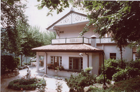 Reale Società Canottieri Cerea, Turin